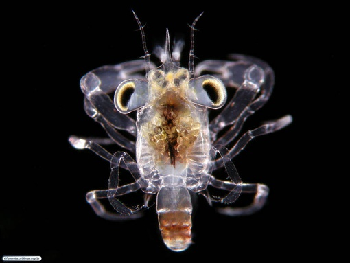 Estágio de desenvolvimento de megalopa, presente em decapodas da infraordem brachyura